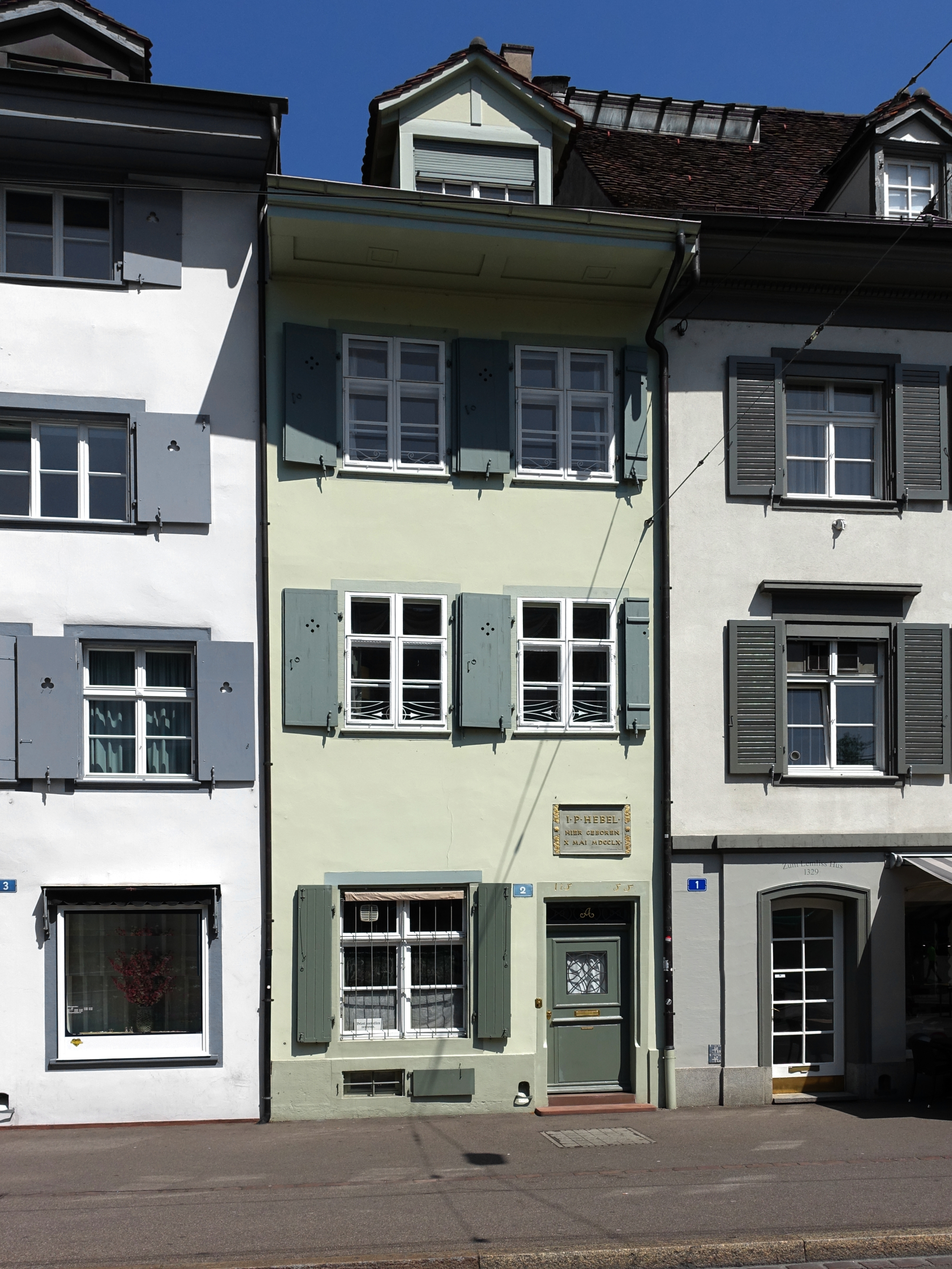 Geburtshaus von Johann Peter Hebel (1760–1826), Totentanz 2 in Basel